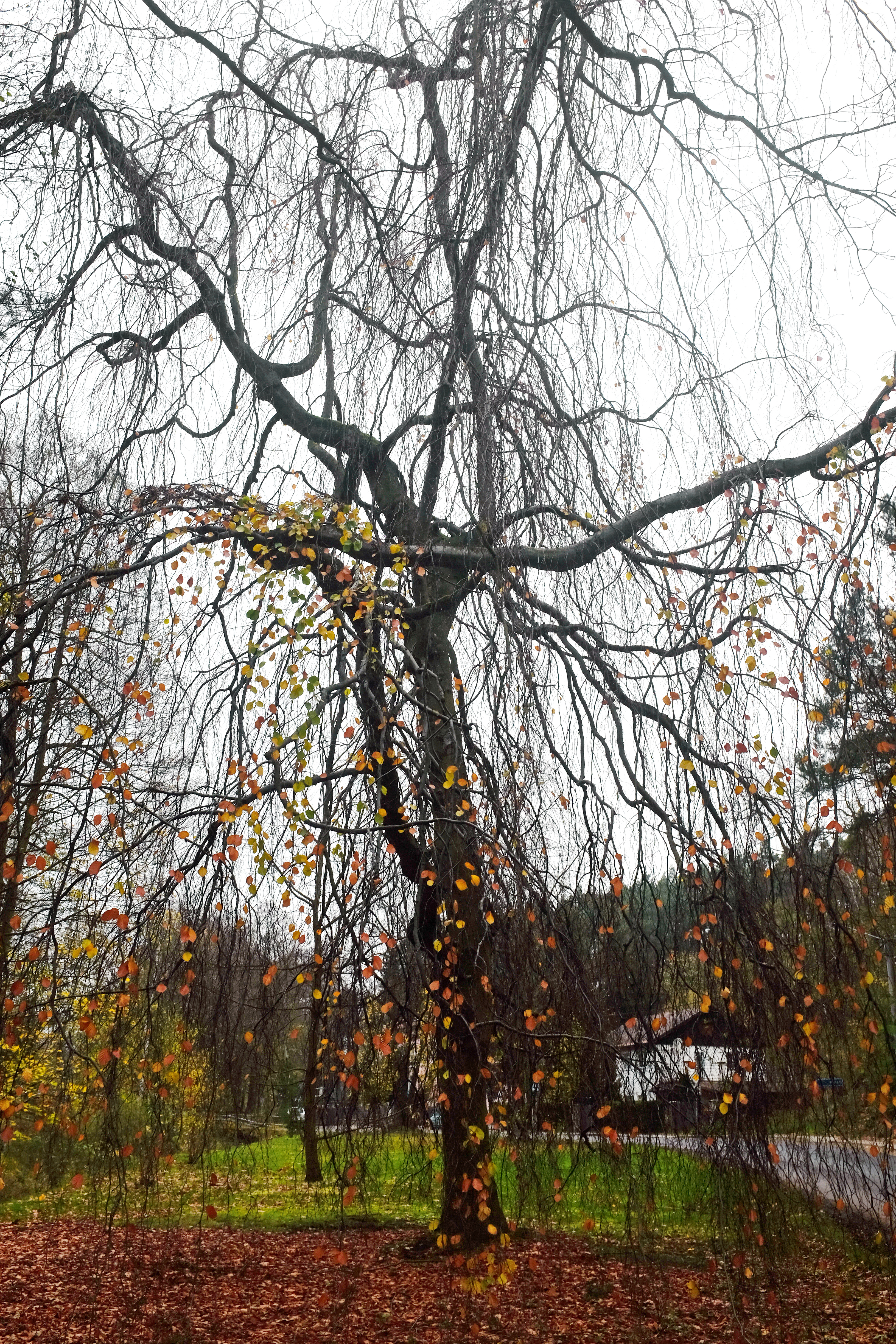 Památný strom - Smuteční buk u školy - Sadov, okres Karlovy Vary